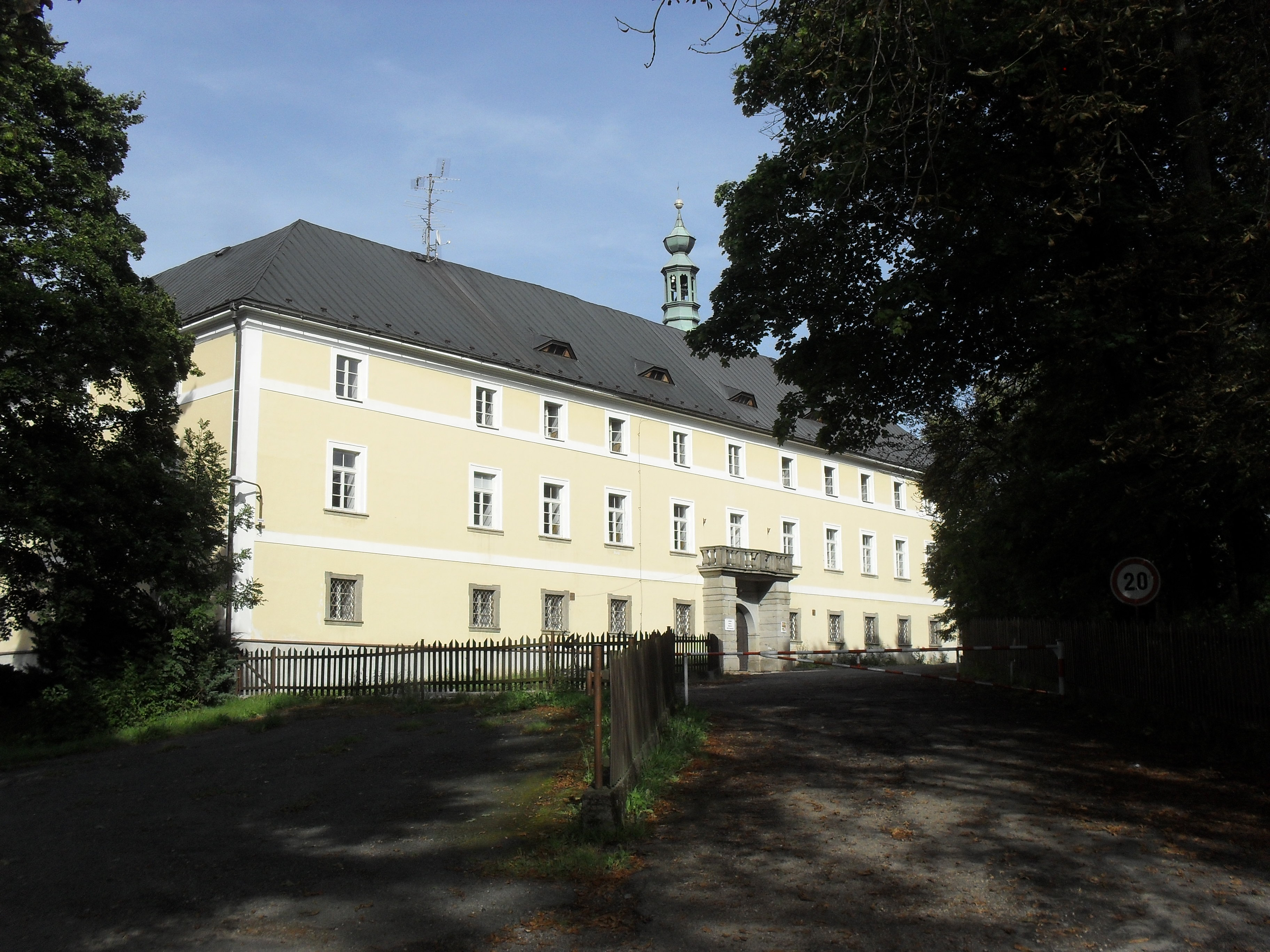 Fotografie pořízena v obci Oselce